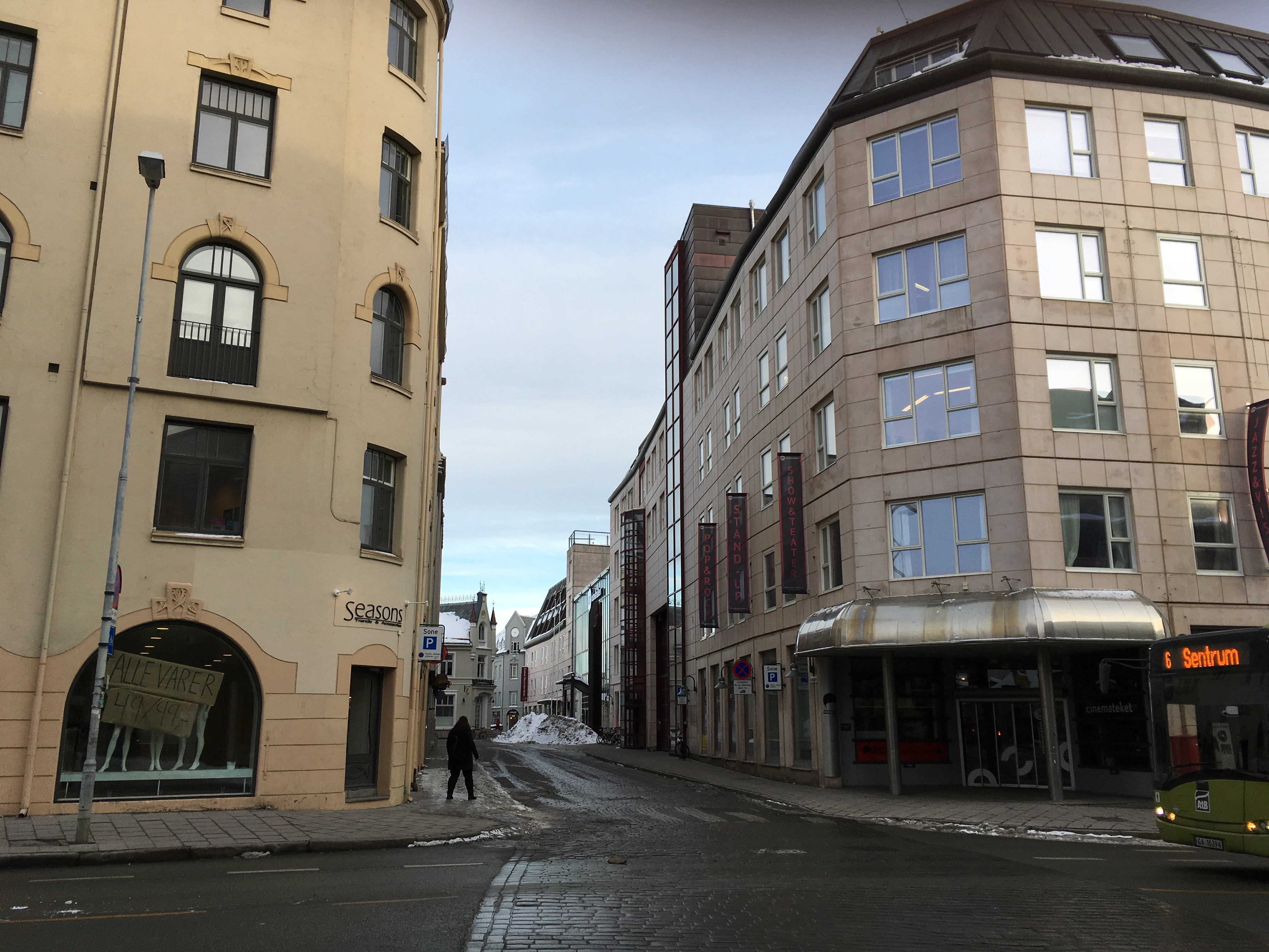 Krambugata, Trondheim i 2019, sett nordover fra Olav Tryggvasons gate. Olavskvartalet til høyre